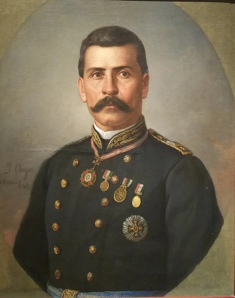 Porfirio Díaz, óleo sobre tela, 1883. Imagen tomada del libro: Guadalupe Jiménez Codinach, México, Proyectos de una Nación, 1821- 1888, México, Fomento Cultural Banamex, 2001, p. 452.